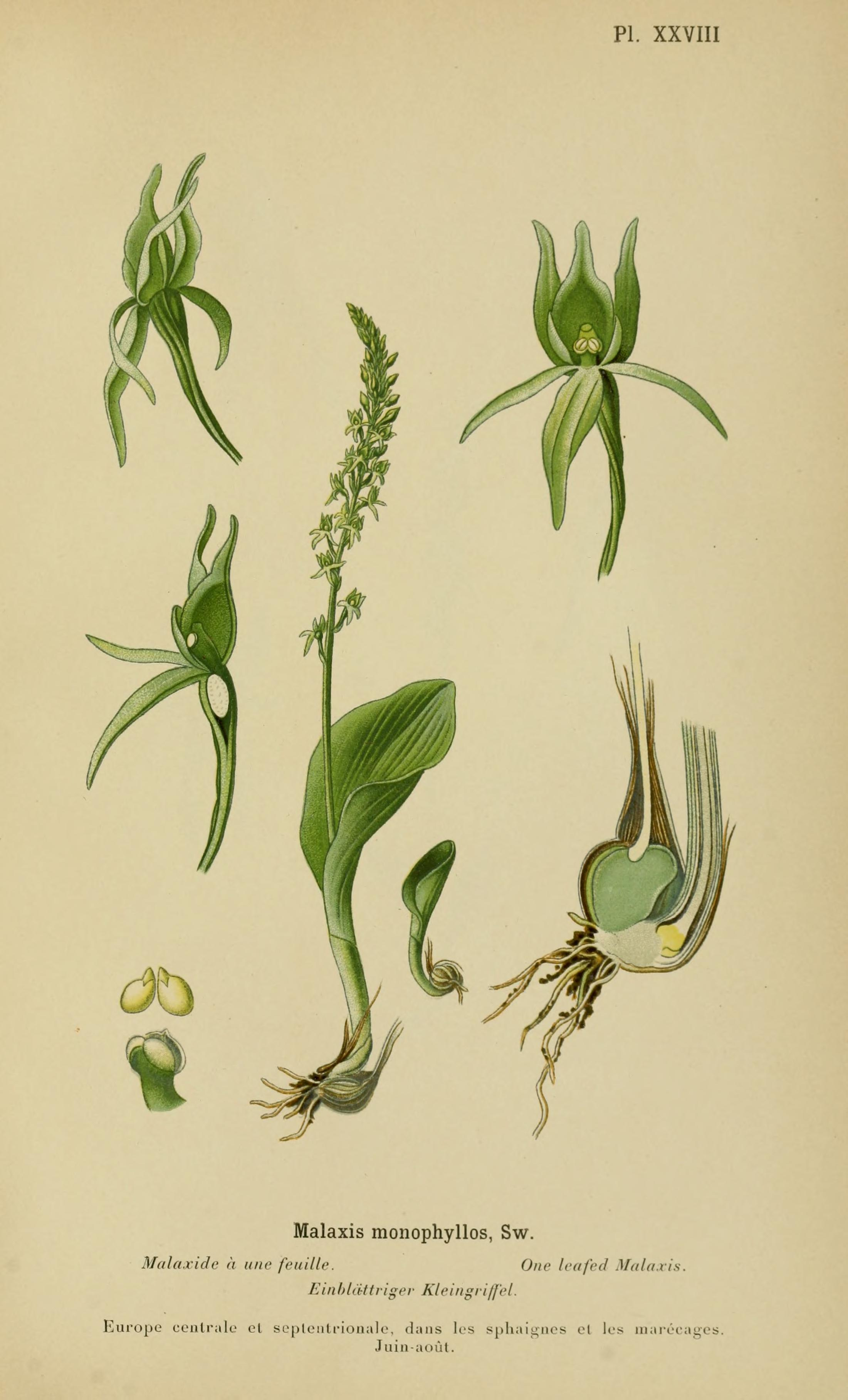 PI. XXVIII Malaxis monophyllos, Sw. Malaxide à une feaillr. One leafed Malaxis. Einbliirttriger Kleifigii/fcl. Europe contralc el seploiilfionale, dans les gpliaigiics el les marécages. Juiiiaoùt.